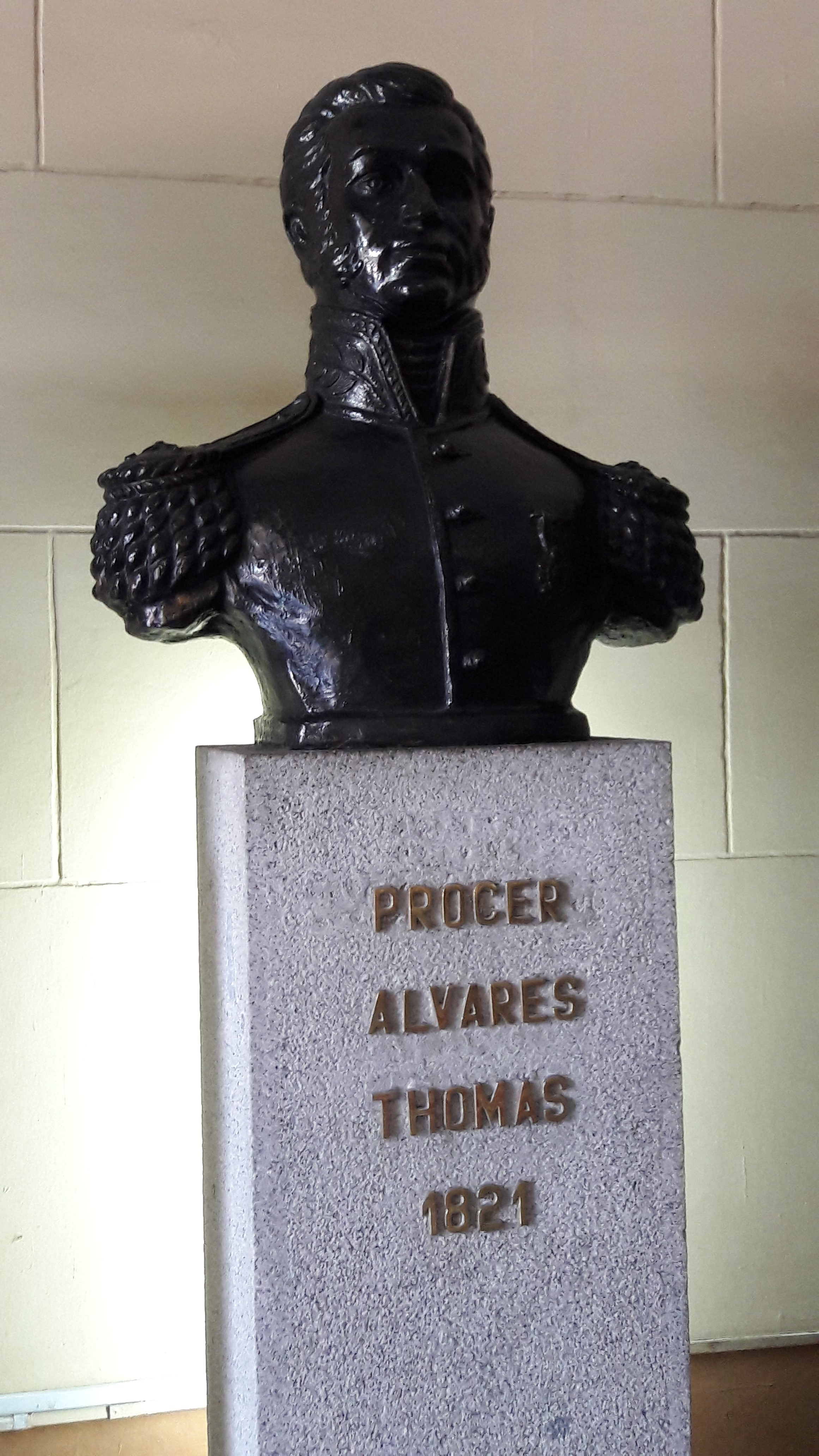 Prócer Alvares Thomas 1821